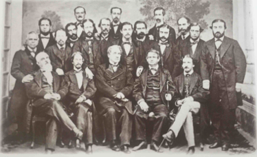 Álbum de Ignacio Triguero, Ma. Teresa Bermudez